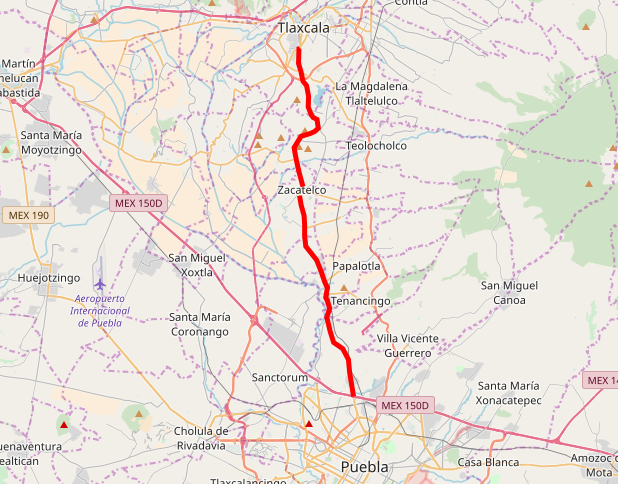 Un mapa de la Carretera Federal 119 (Puebla-Tlaxcala)